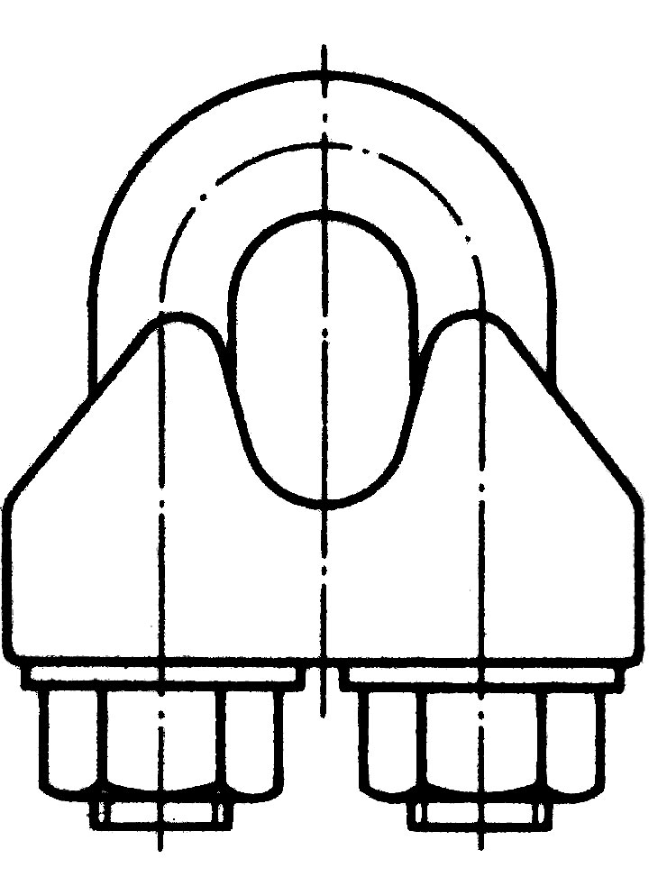 Seelklemm.